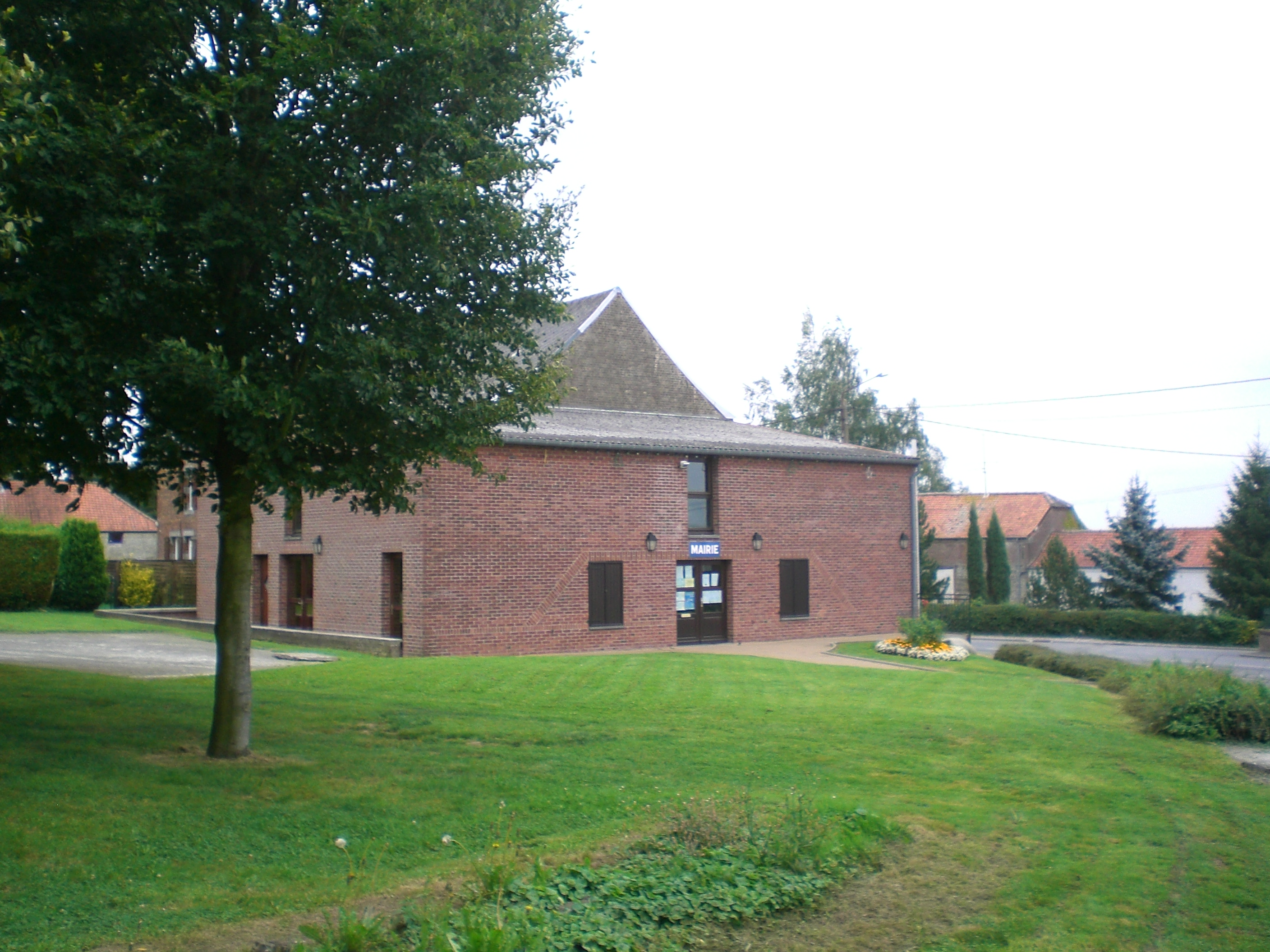 mairie de Wattignies-la-Victoire nord france